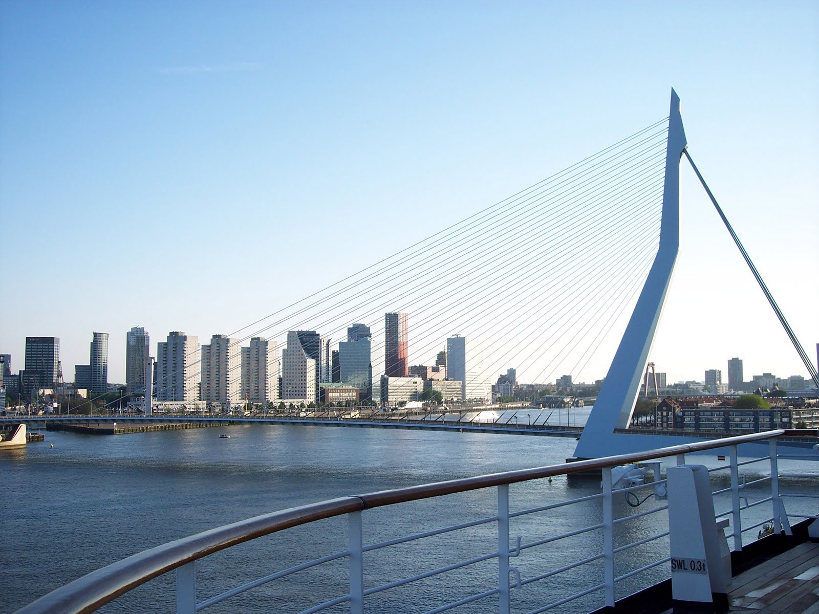 206 Rotterdam bridge.jpg